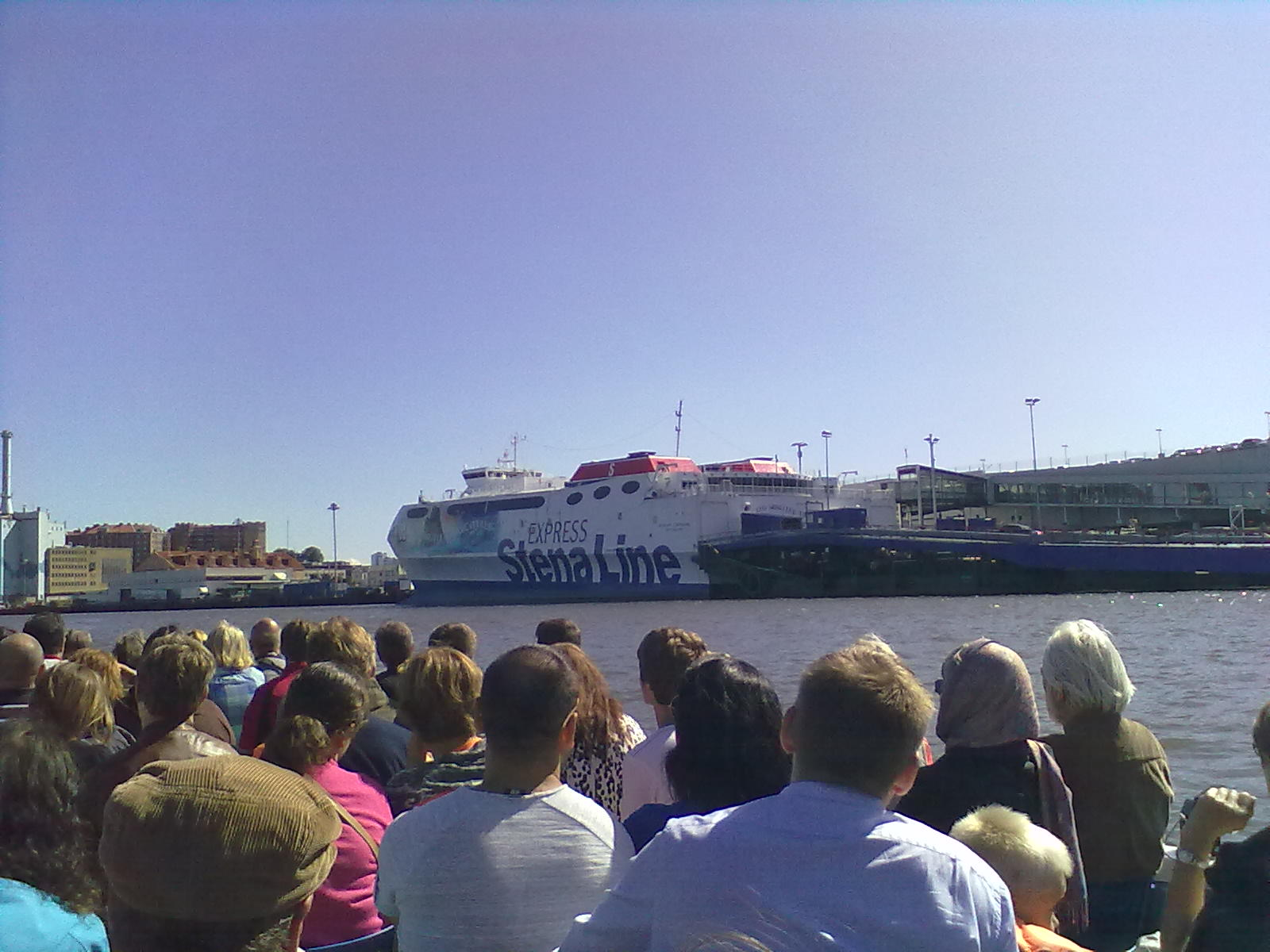 Das Schiff "Stena Carisma" liegt an seiner Anlegestelle, am Terminal der "Stena Line" in Göteborg. Fotografiert am 27. August 2014, um 12:17 Uhr.